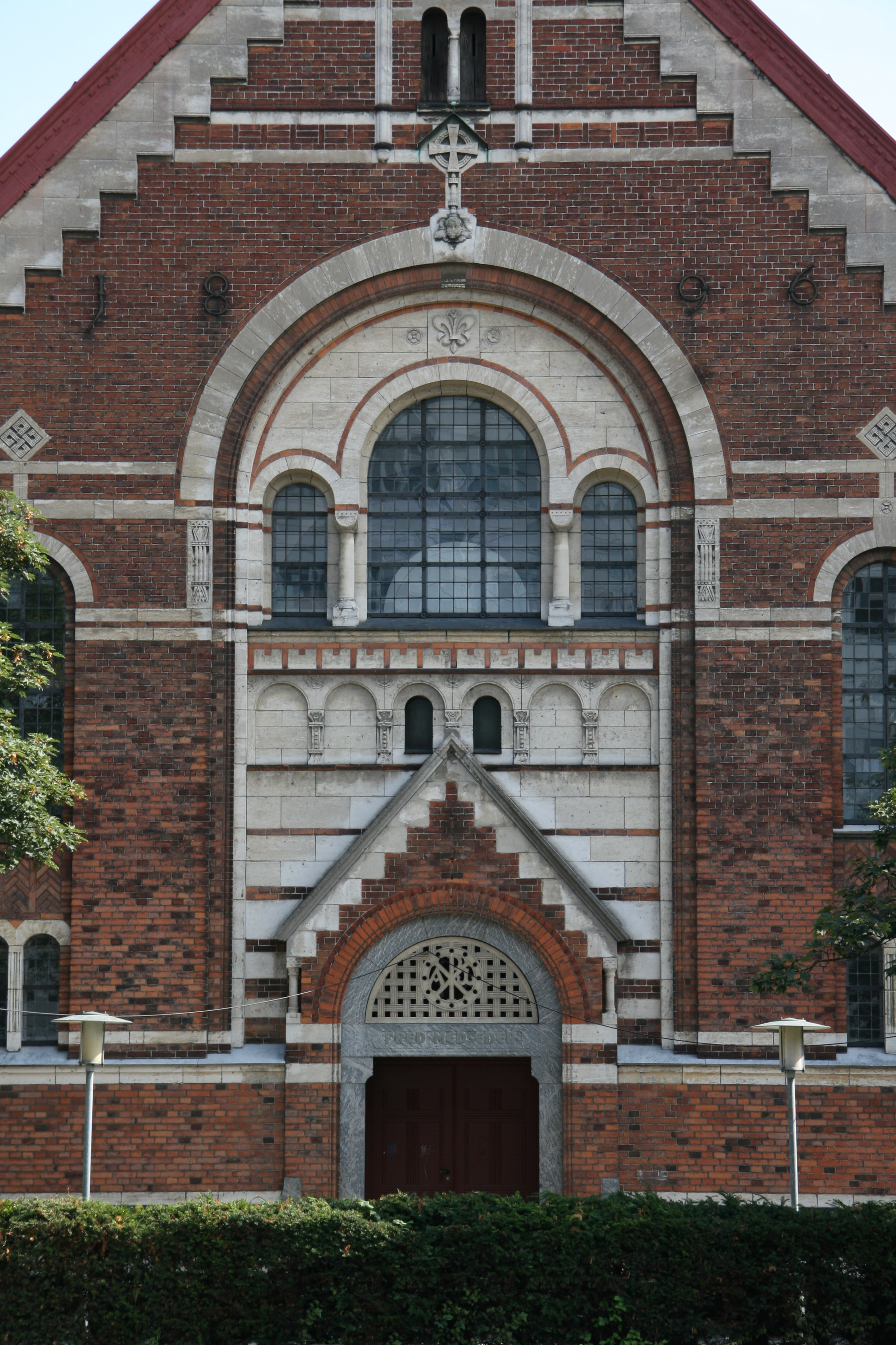 Sions Kirke in Copenhagen, Denmark. Entrance detail.